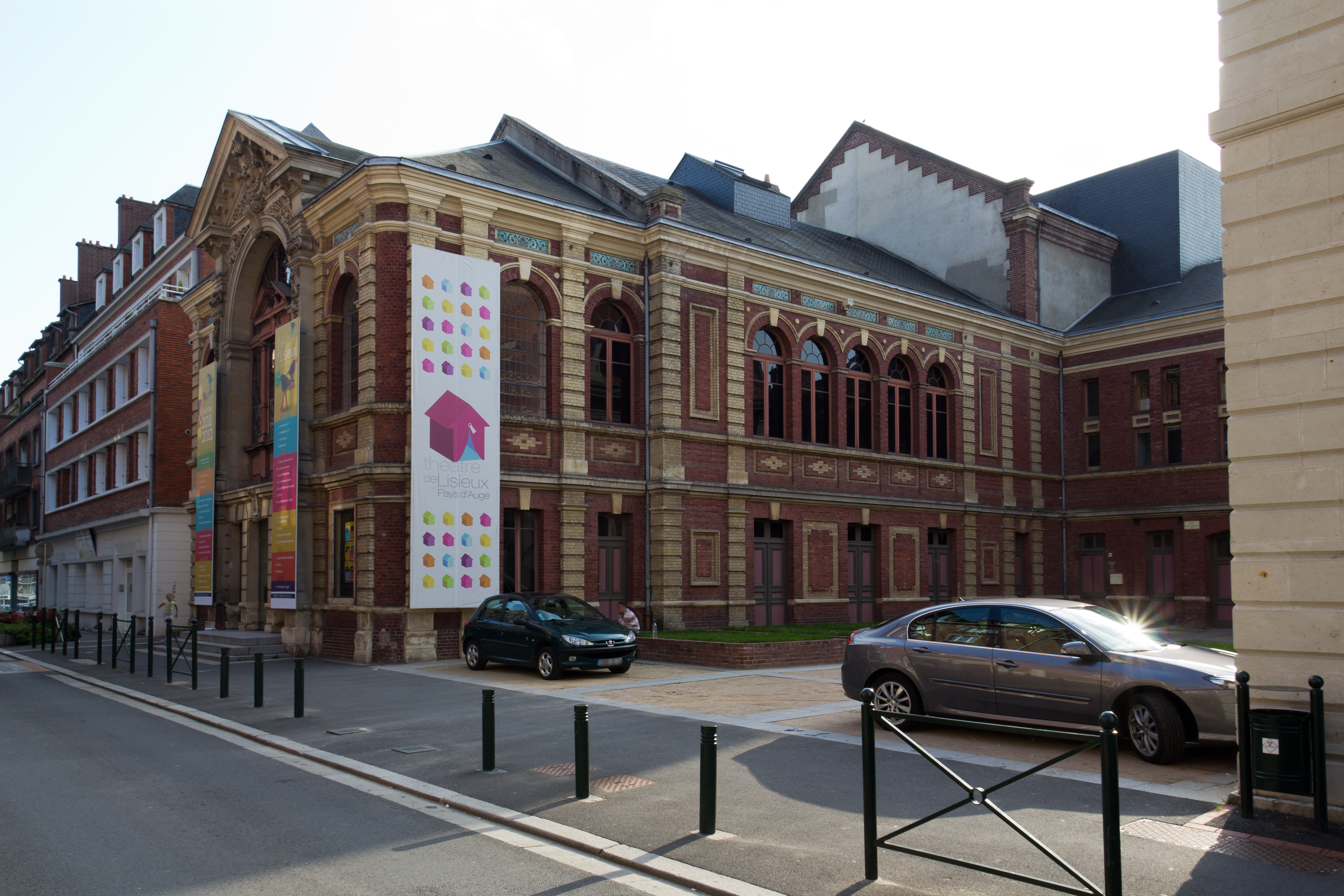 Vue nord-est du théâtre municipal de Lisieux. .